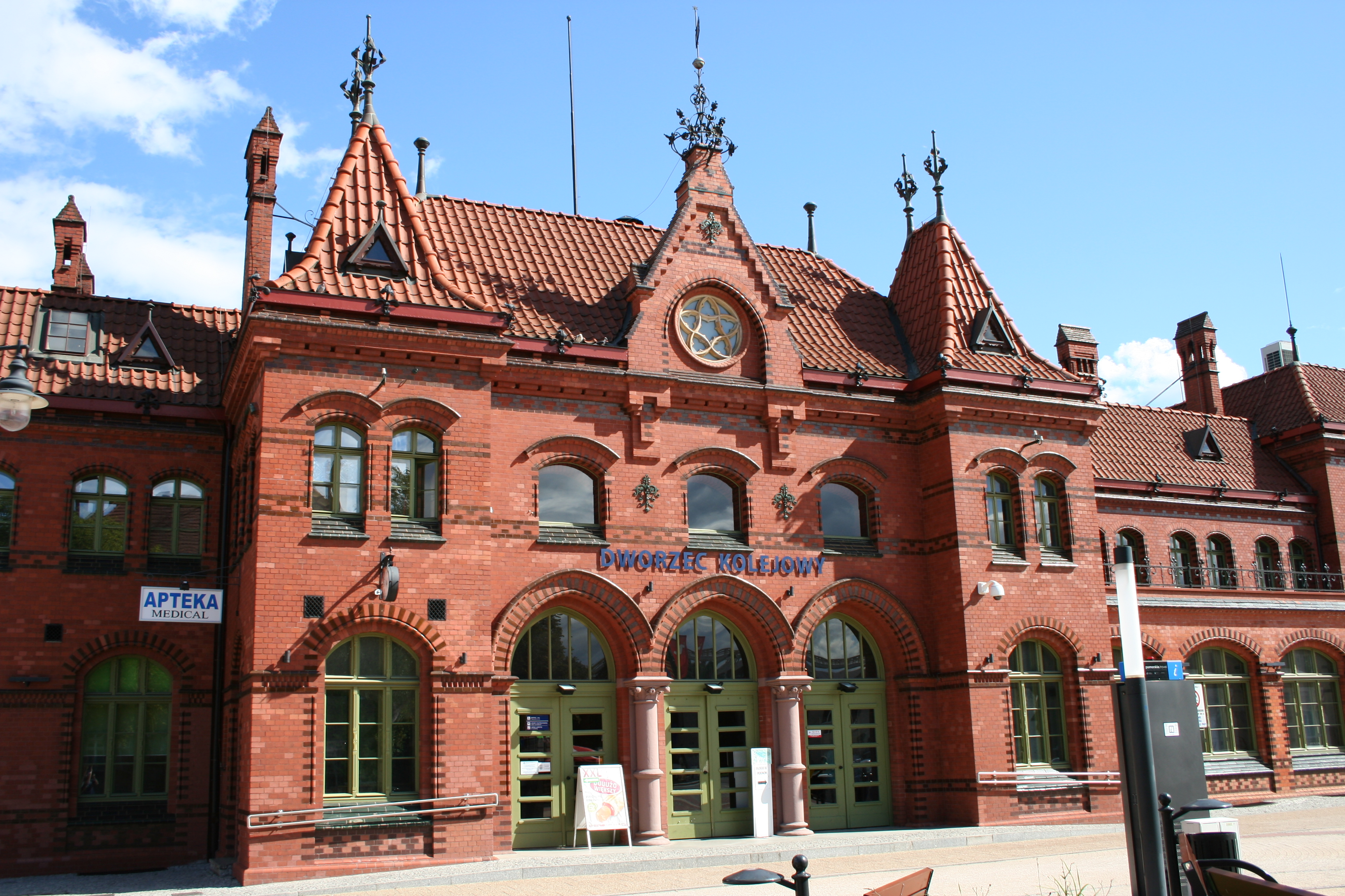 Malbork, dworzec PKP